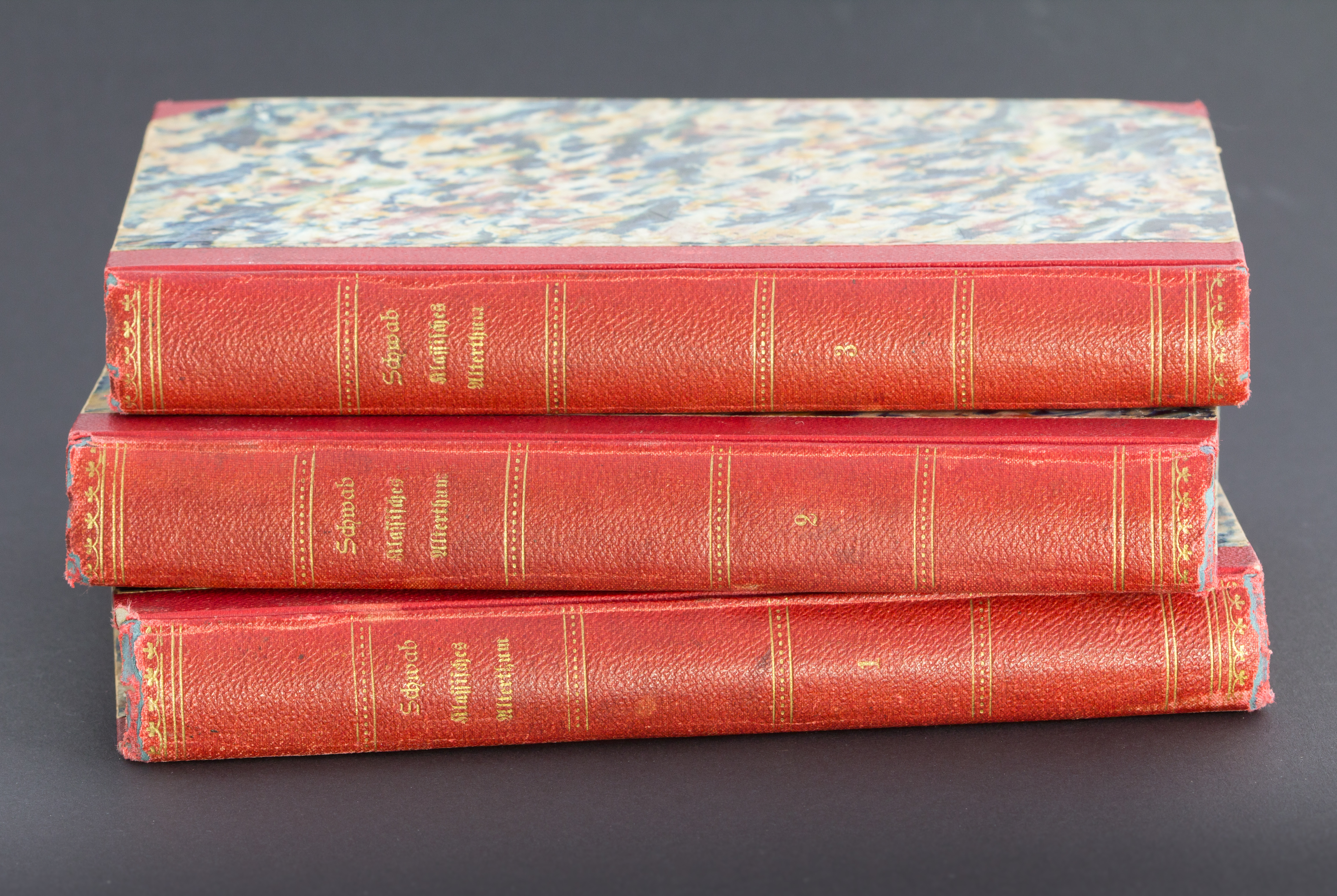 Schwabs Sagen des klassischen Altertums, Erstausgabe Buchrücken